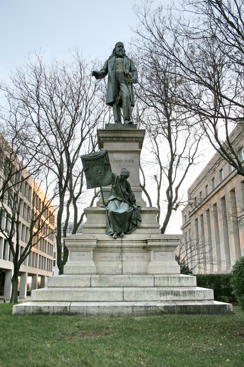 Brigadier General Albert Pike statue in Washington, D.C.